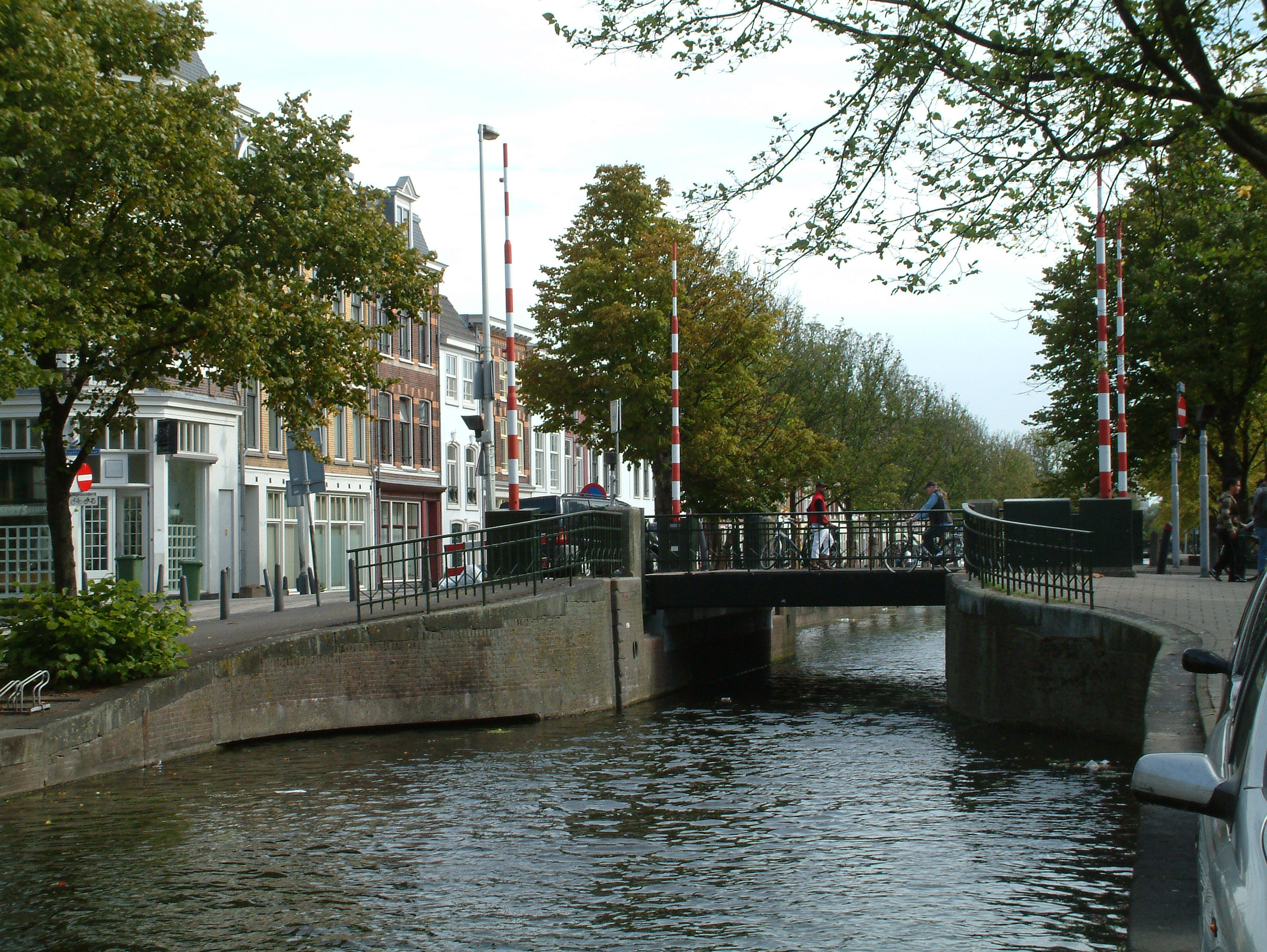 Brug in Den Haag